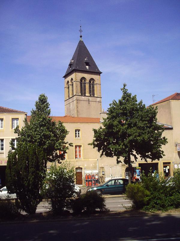 Eglise saint Maximin.